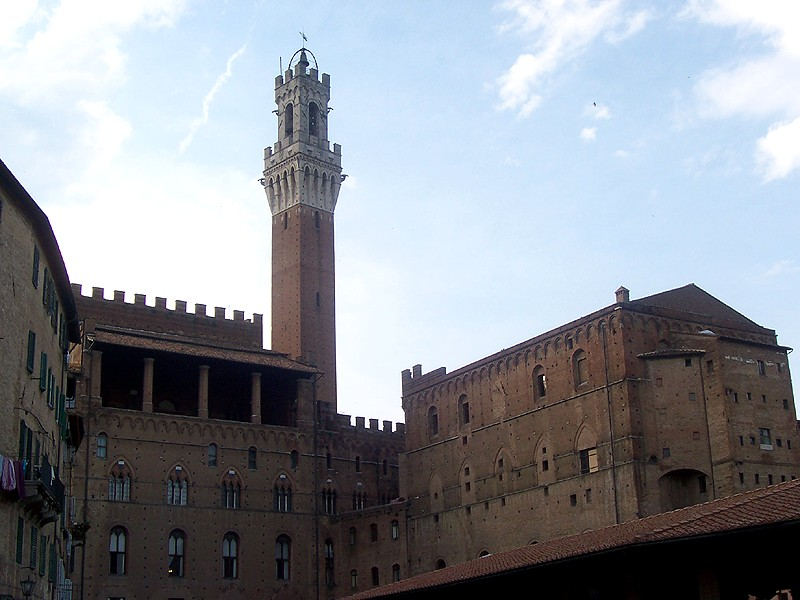 Siena - Palazzo Pubblico (parte posteriore) e Torre del Mangia